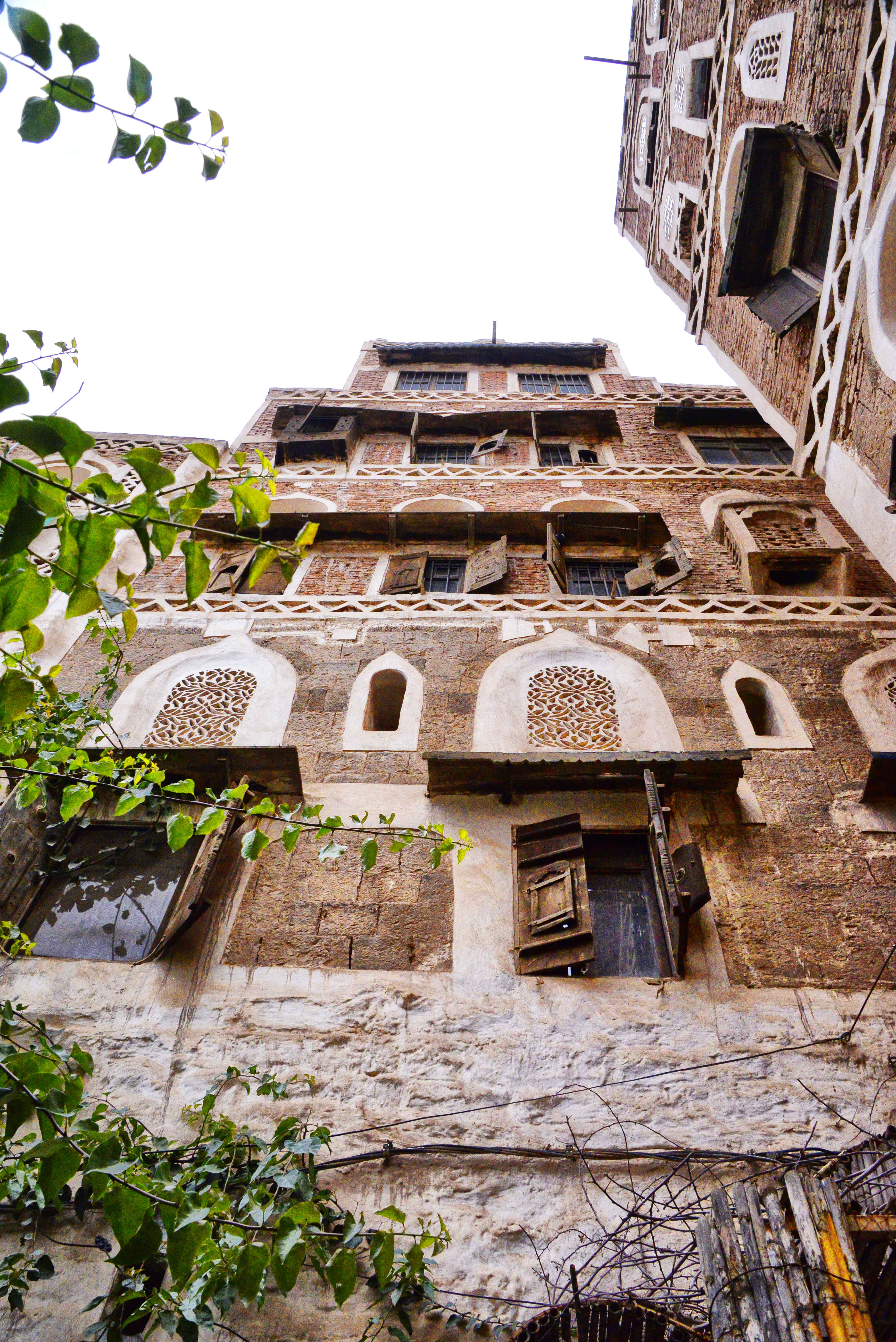 Sana'a, Yemen